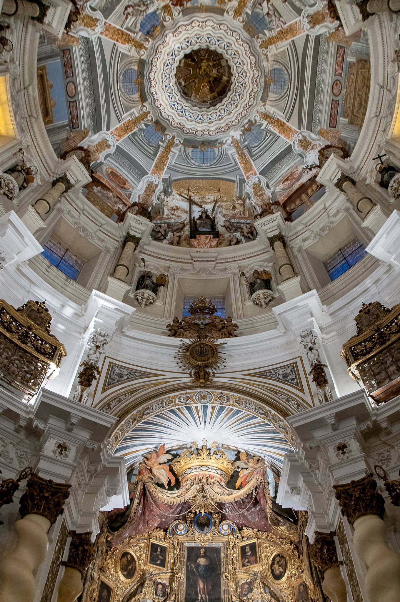 Iglesia de San Luis de los Franceses. Sevilla.